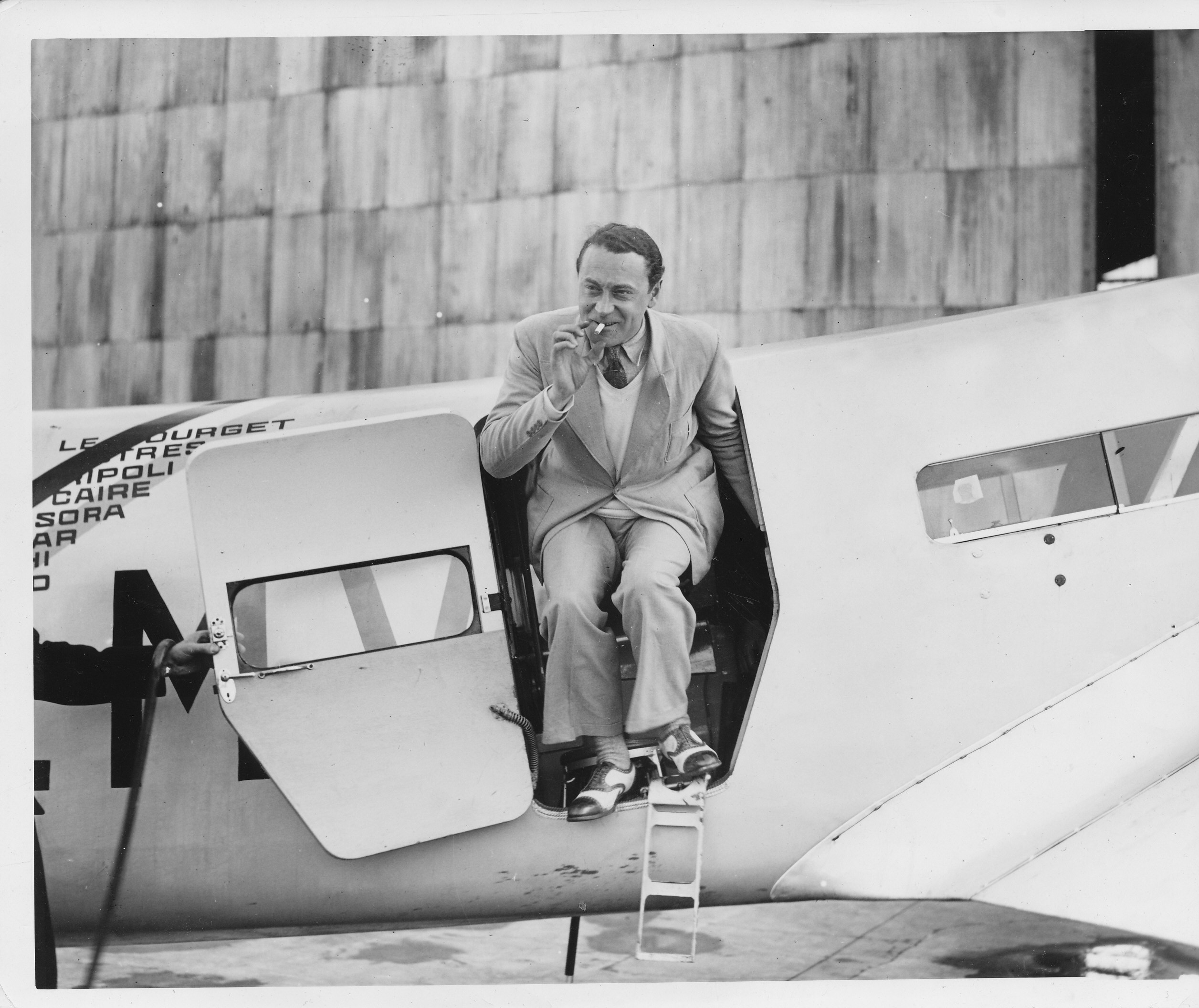 Biarritz porte avec ReneCouzinet 1933